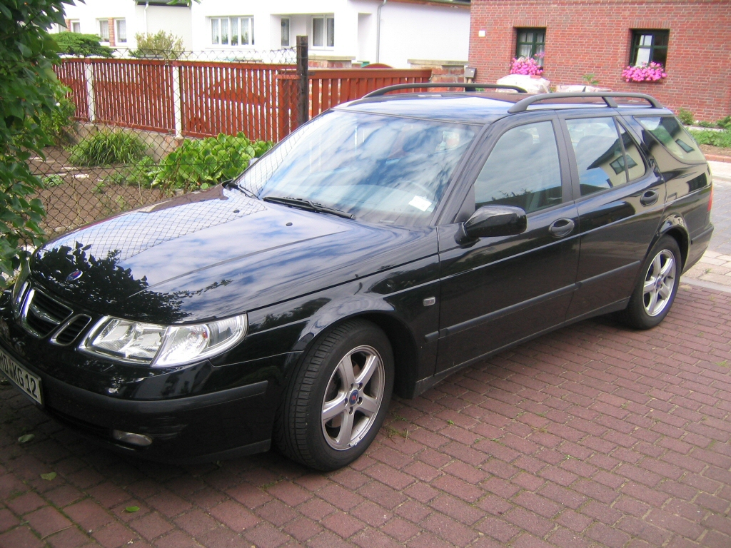 Saab 9-5 Kombi